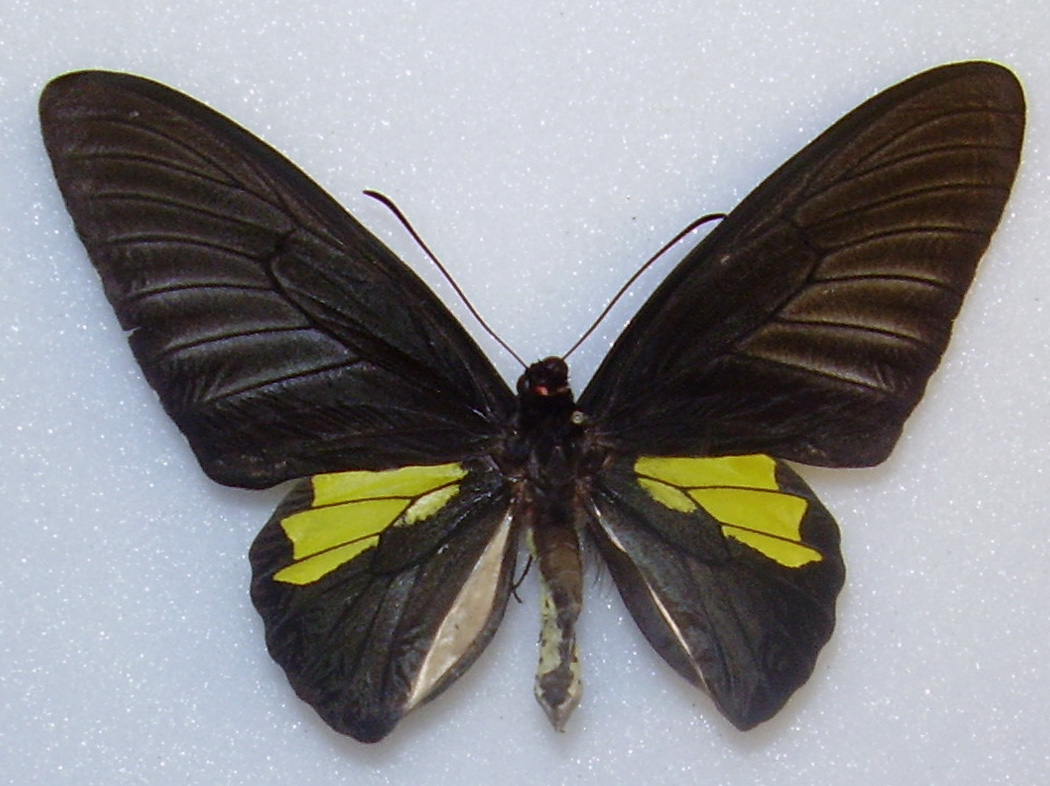 Troides plateni Palawan